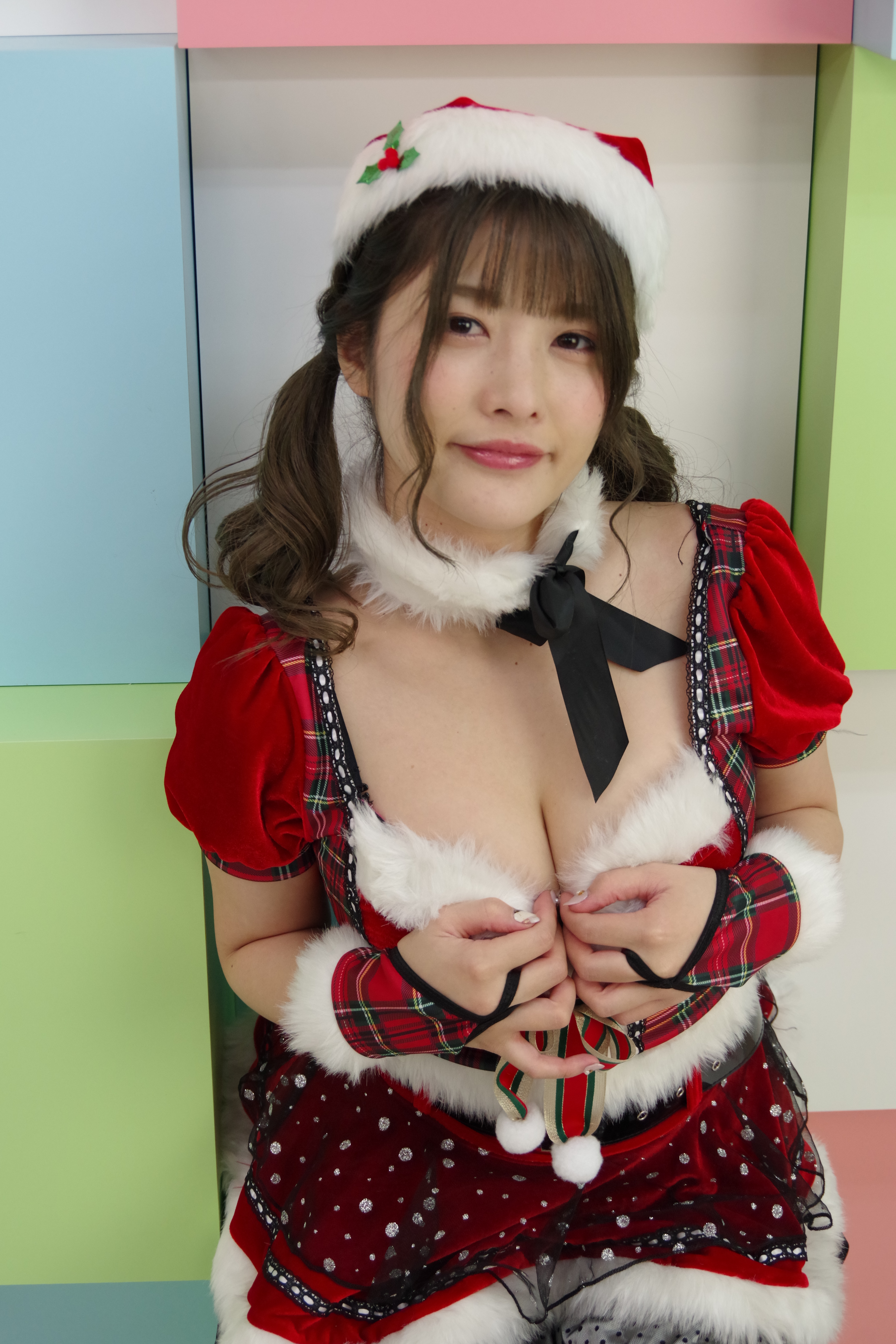 2019年12月22日の撮影会にて